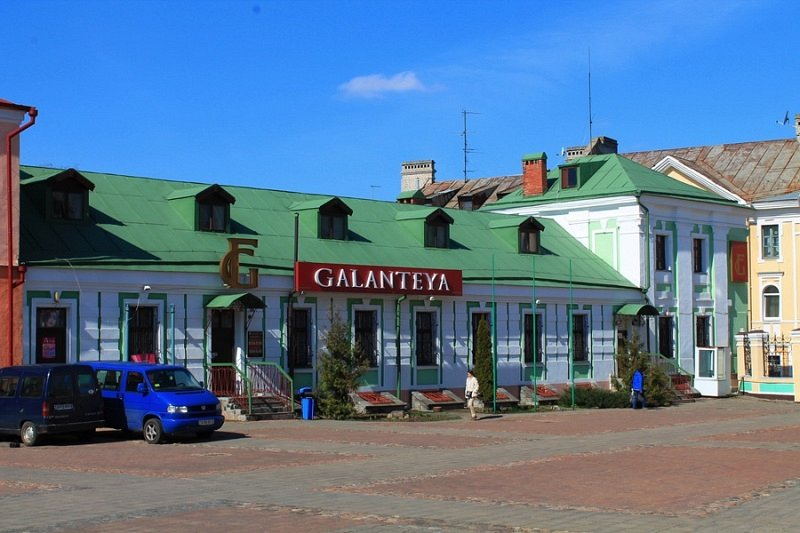 Правы флігель Архірэйскага падворка